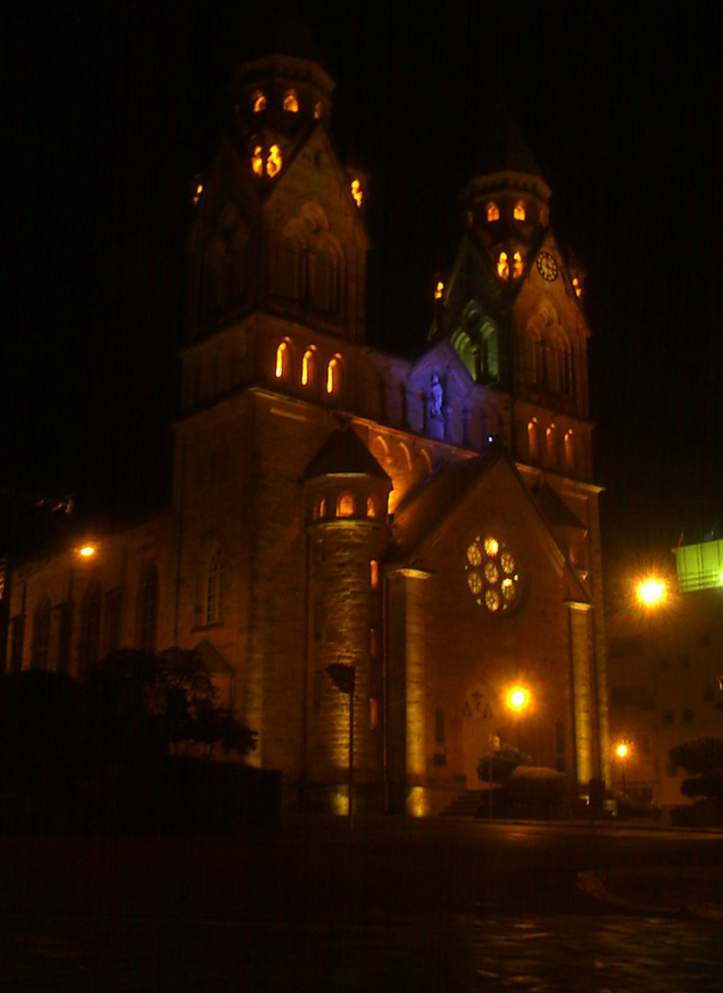 Catedral Diocesana da cidade de Lages, Santa Catarina, Brasil. Autor: Erico Schuch URL